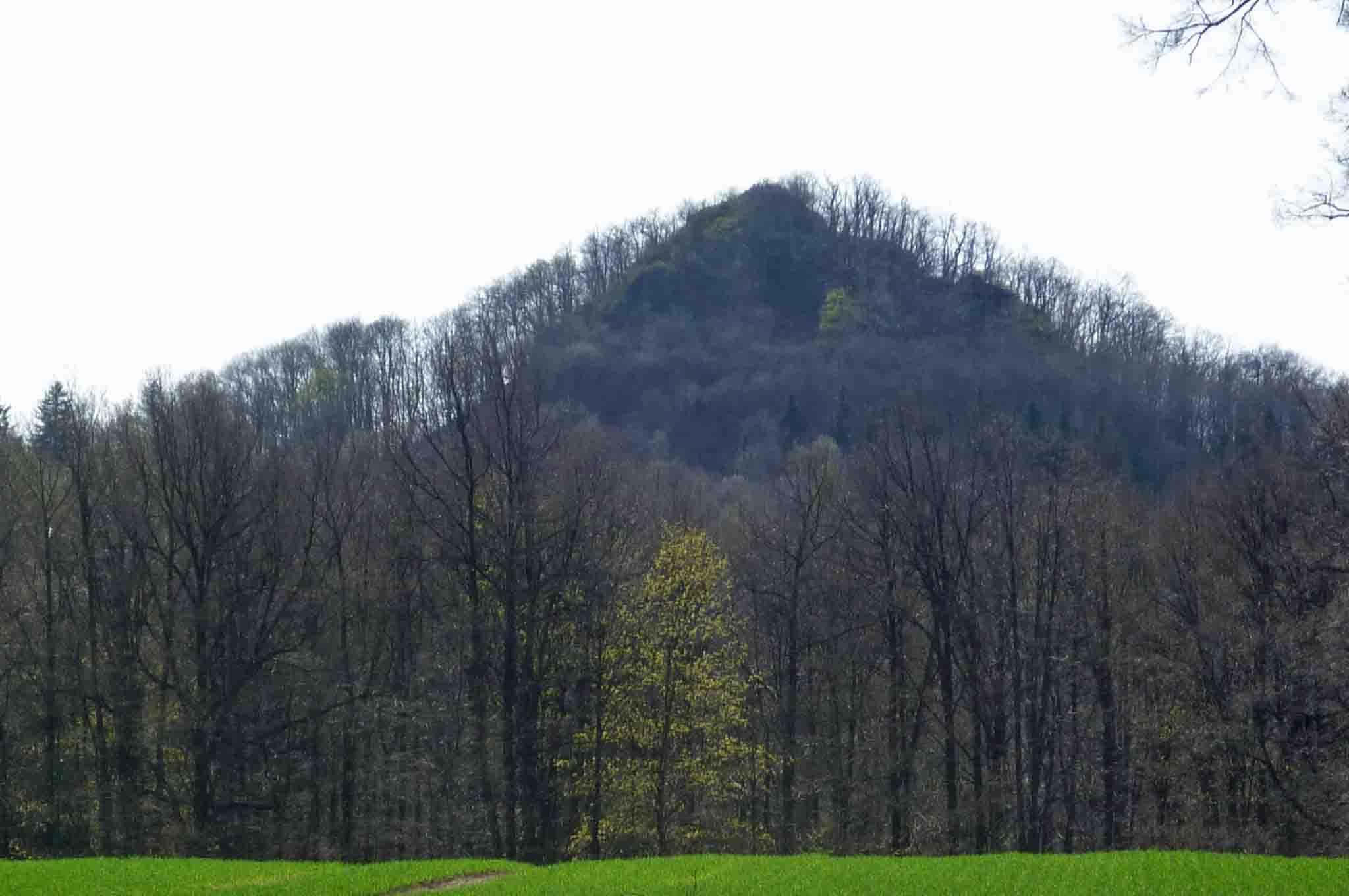 Blick zum Probsthainer Spitzberg (Basalt) im Bober-Katzbach-Gebirge